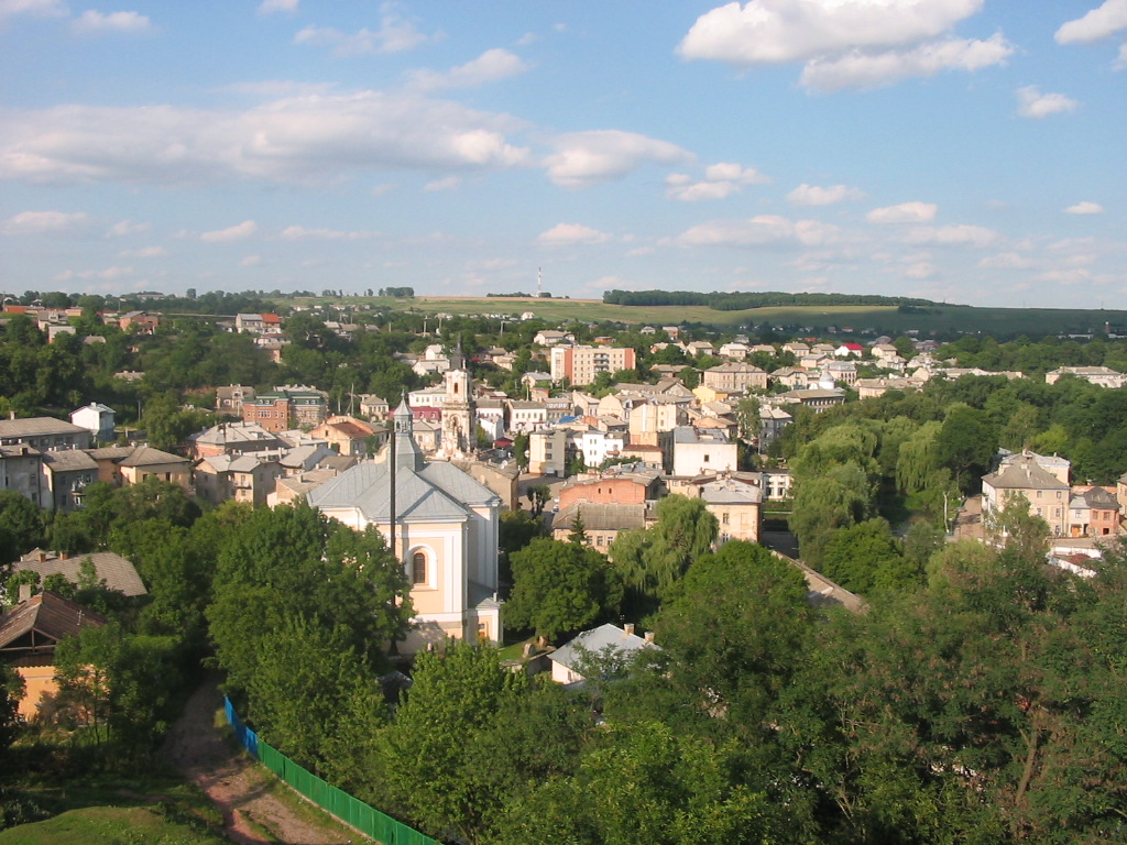 Buchach, western Ukraine